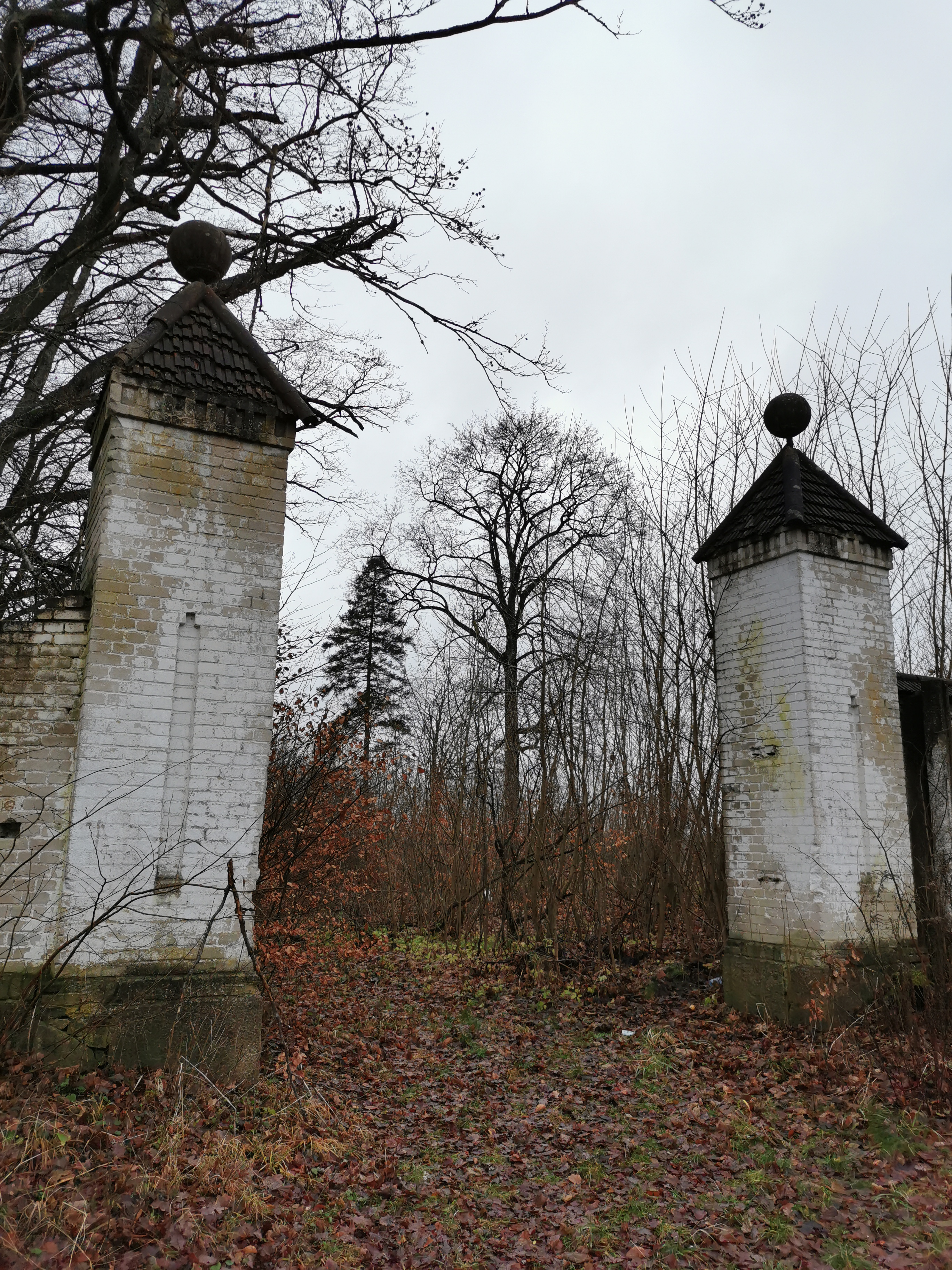 Słupy bramne w parku w Łabiszewie